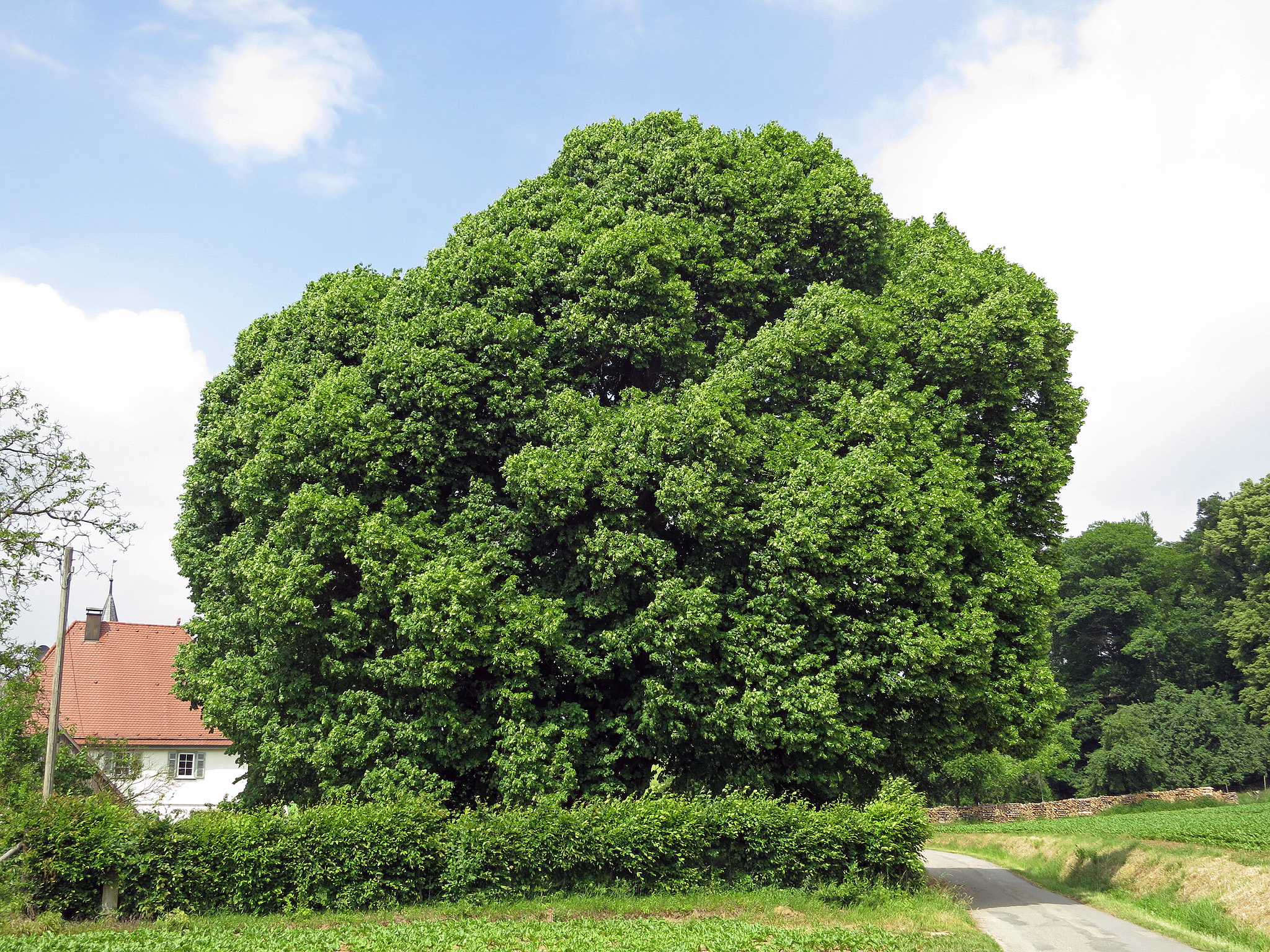 Linde Neusaß